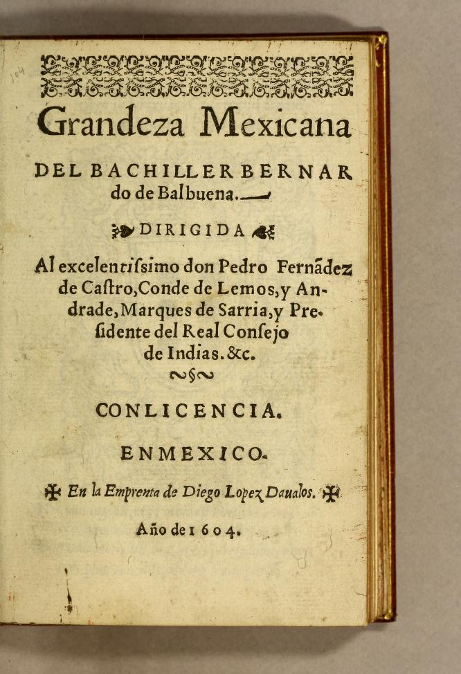 Es una imagen digitalizada por la biblioteca John Carter Brown de la portada de la Obra Grandeza Mexicana de Bernardo de Balbuena impresa por Diego López Dávalos